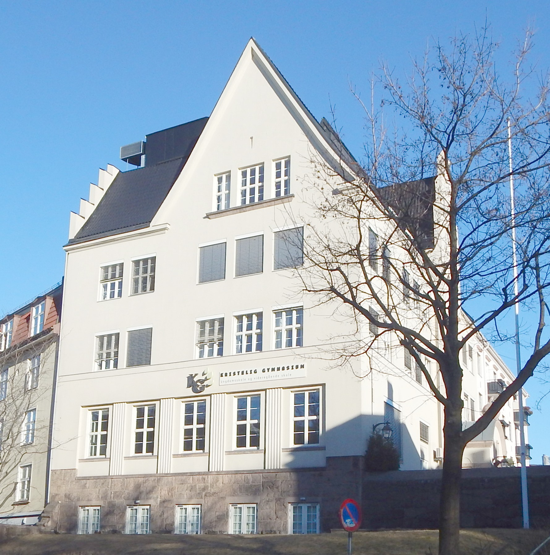 Gamlebygget til Kristelig gymnasium